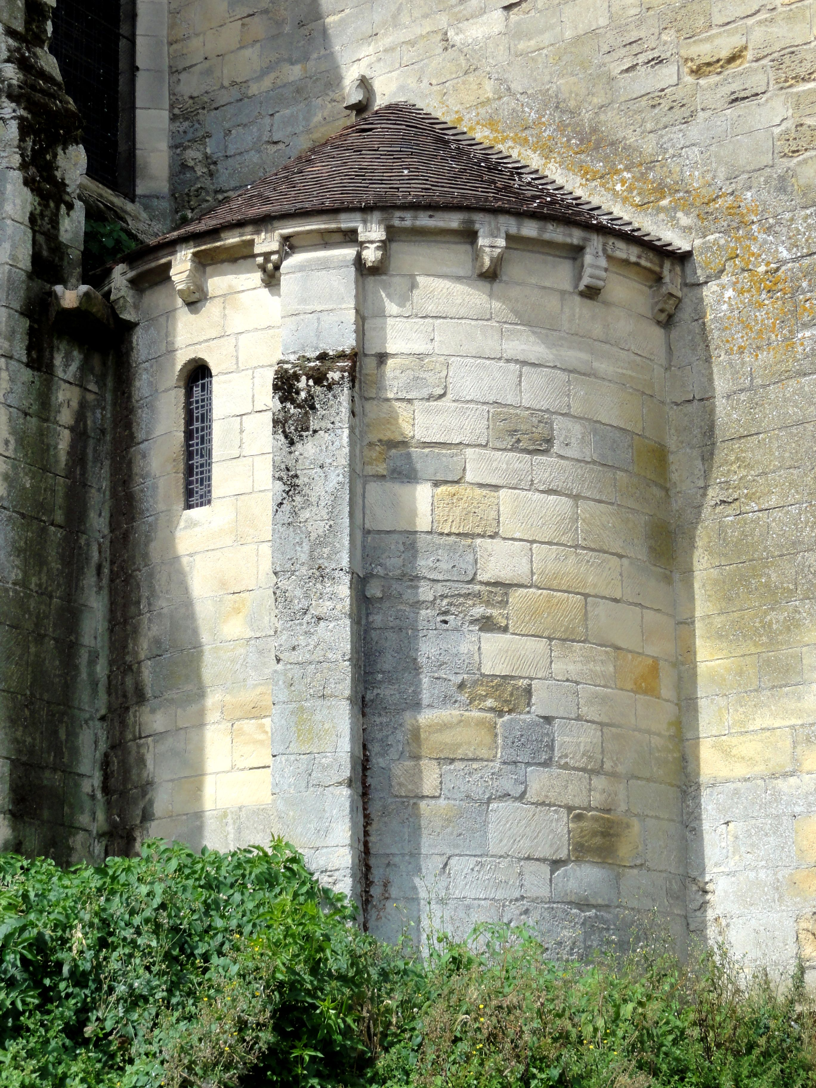 Absidiole nord (il n'y en a plus au sud).